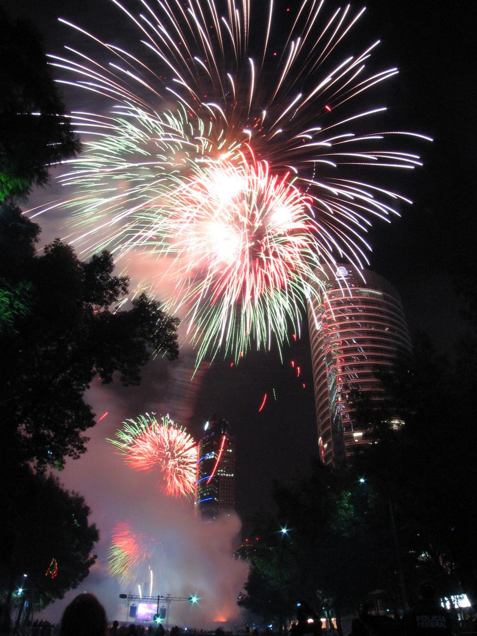 Fuegos artificiales en paseo de la reforma el 15 de septiembrede 2010